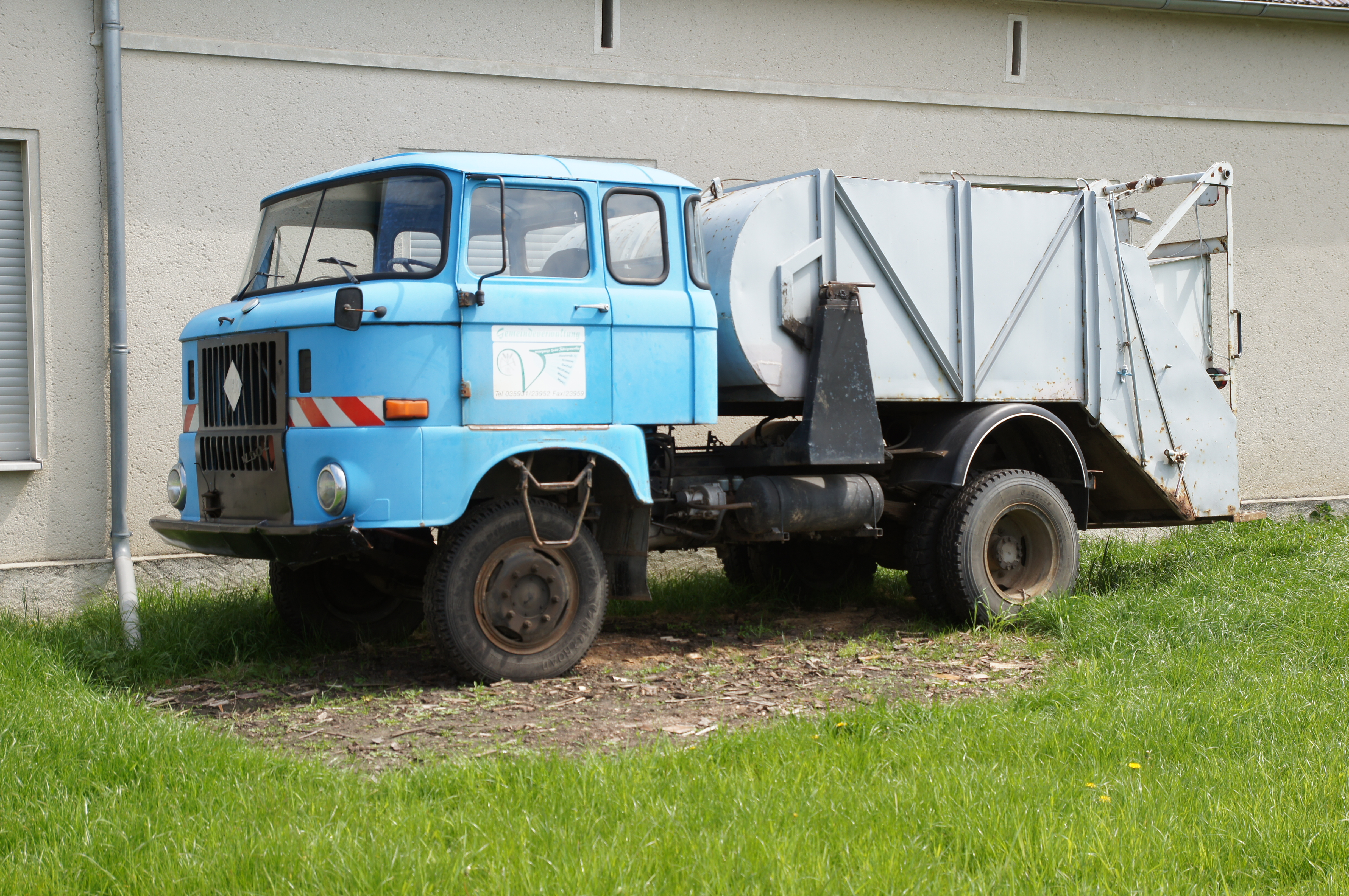 W50 Müllauto